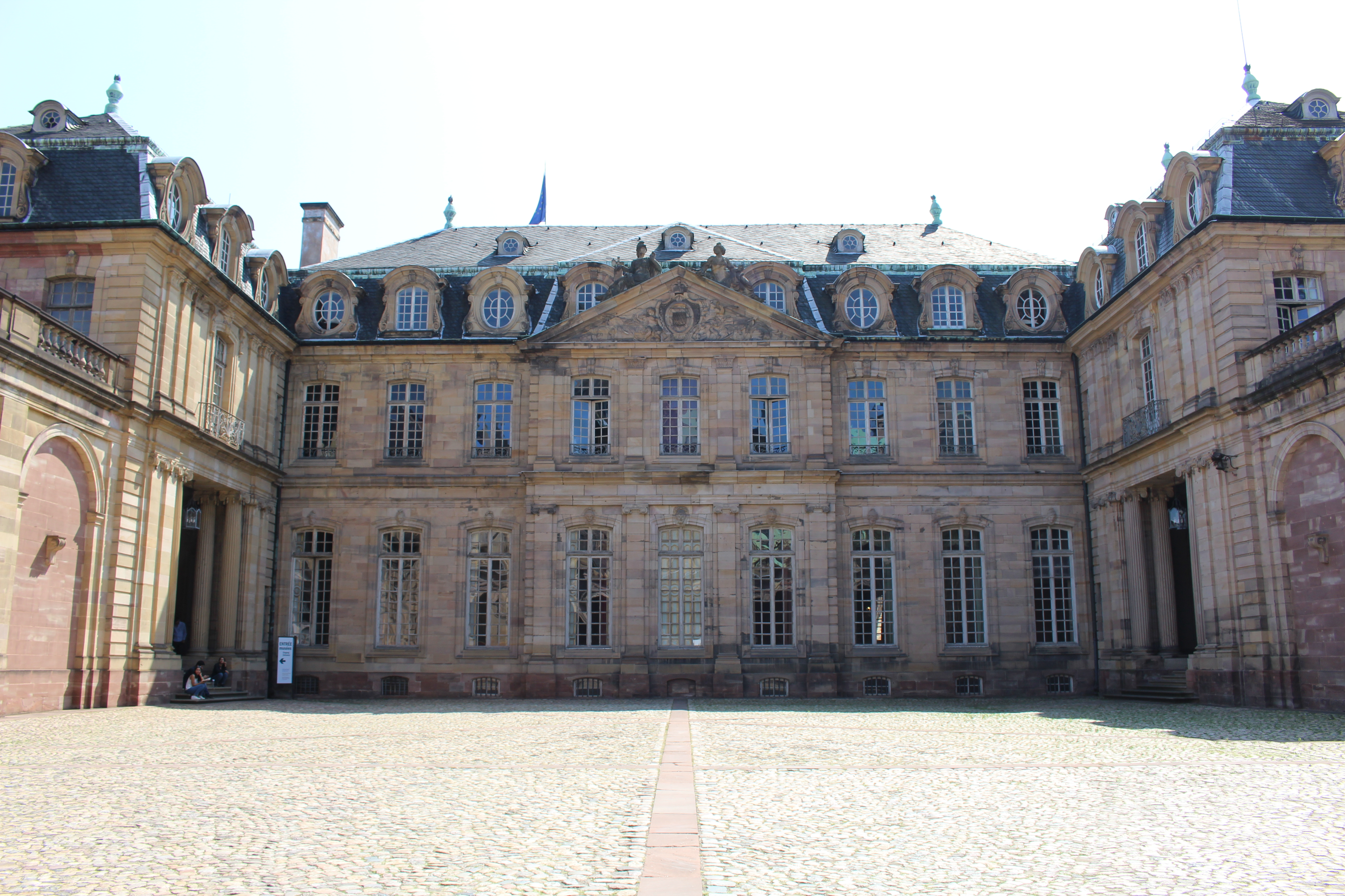 Palais Rohan, Strasbourg.